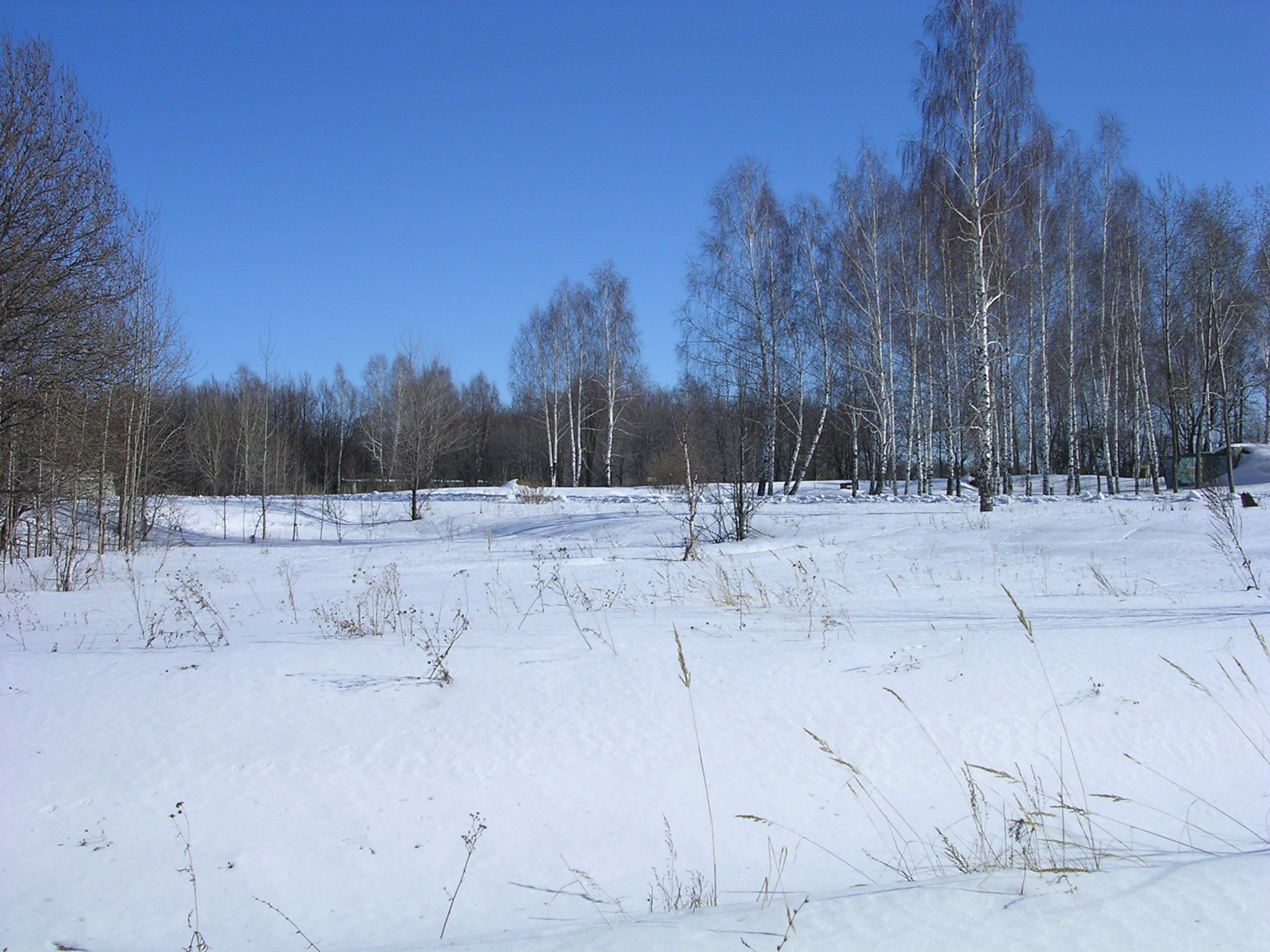 Winter in ulyanovsk region